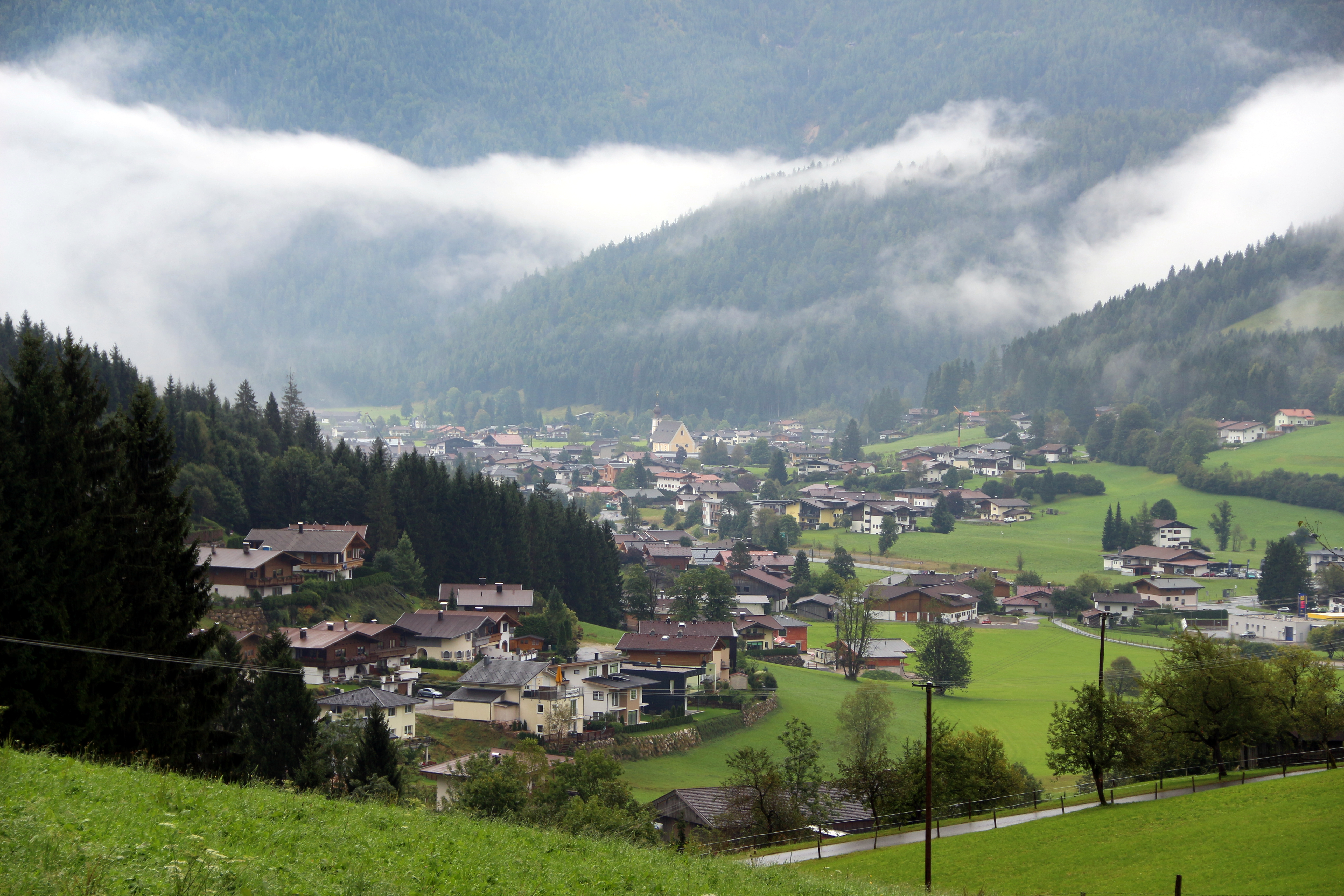 Gemeinde Waidring, gesehen von Nordwesten.